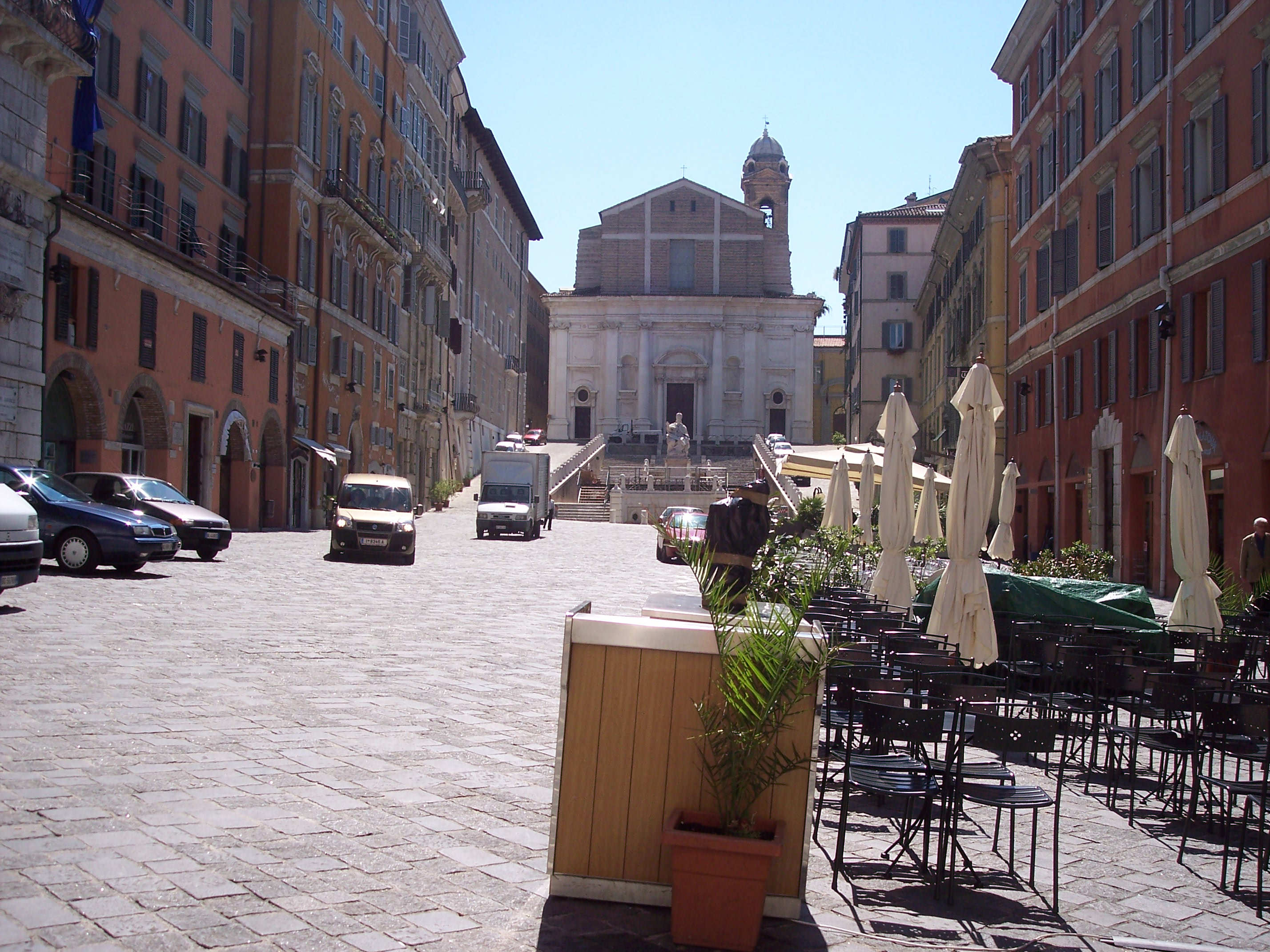 Piazza del Papa